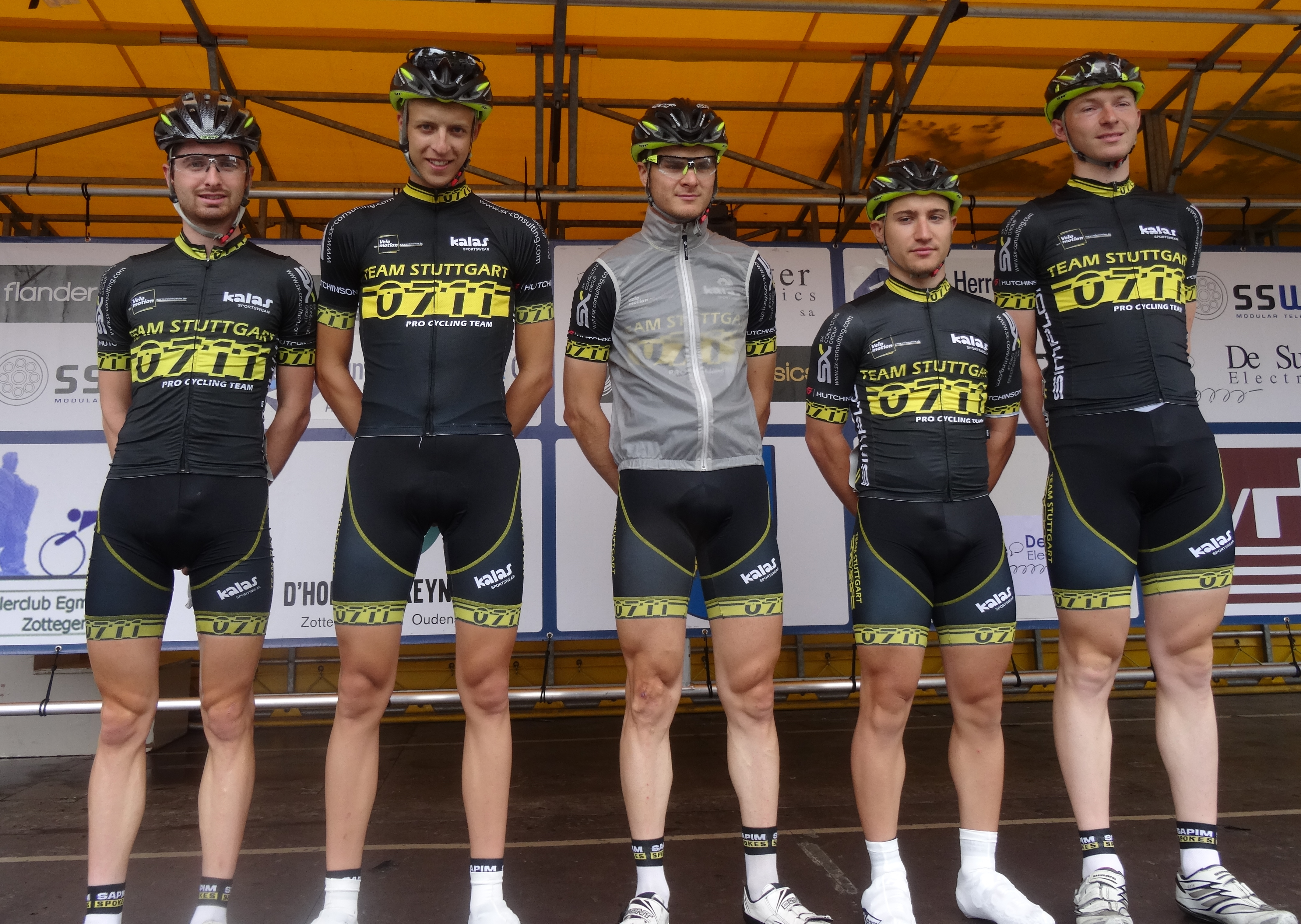 Reportage photographique réalisé le samedi 5 juillet à l'occasion du départ et de l'arrivée du Circuit Het Nieuwsblad espoirs 2014 à Grotenberge (Zottegem), Belgique.